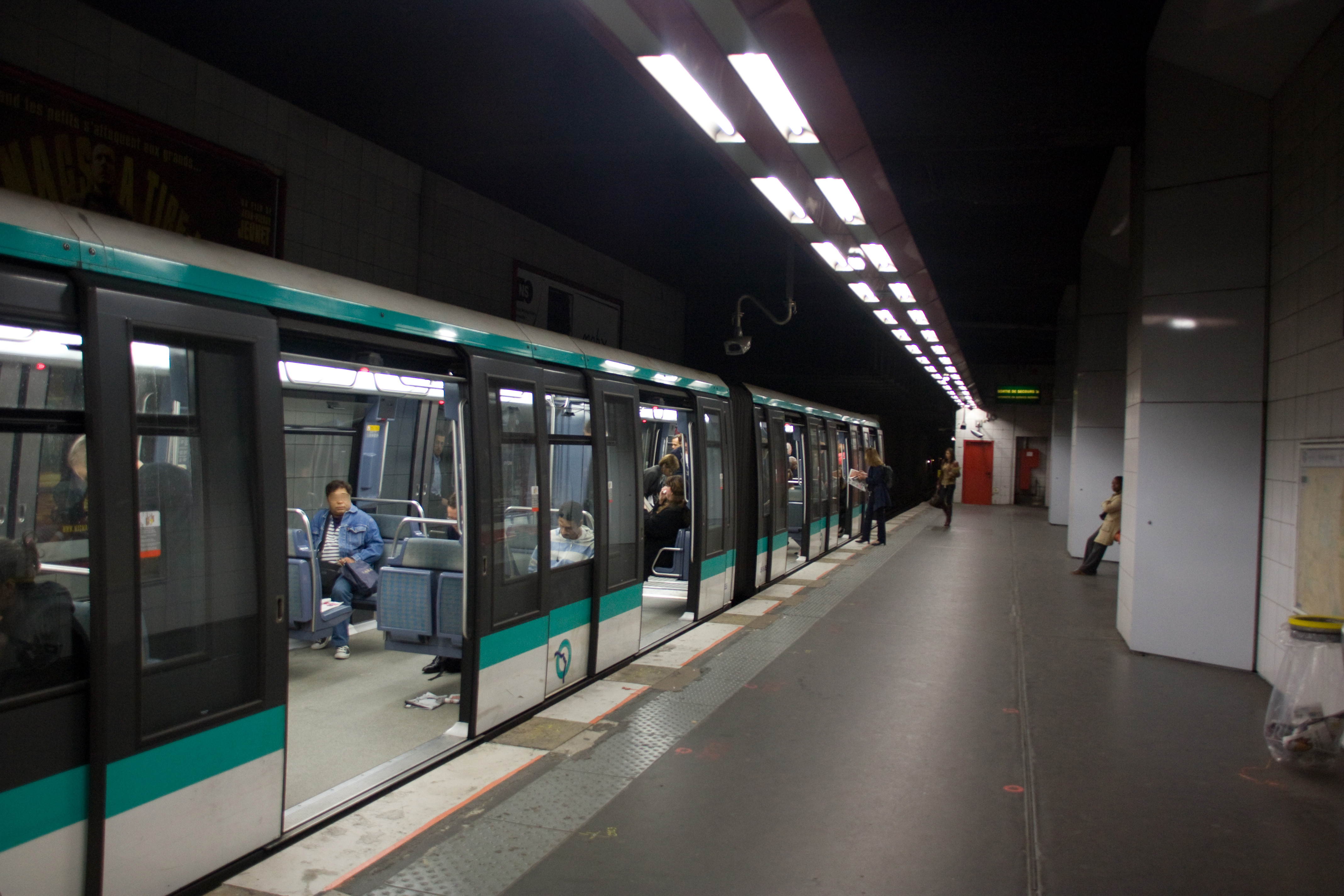 Station Grande-Arche de La Défense, Ligne 1 métro de Paris. (La demie-station, coté départ)